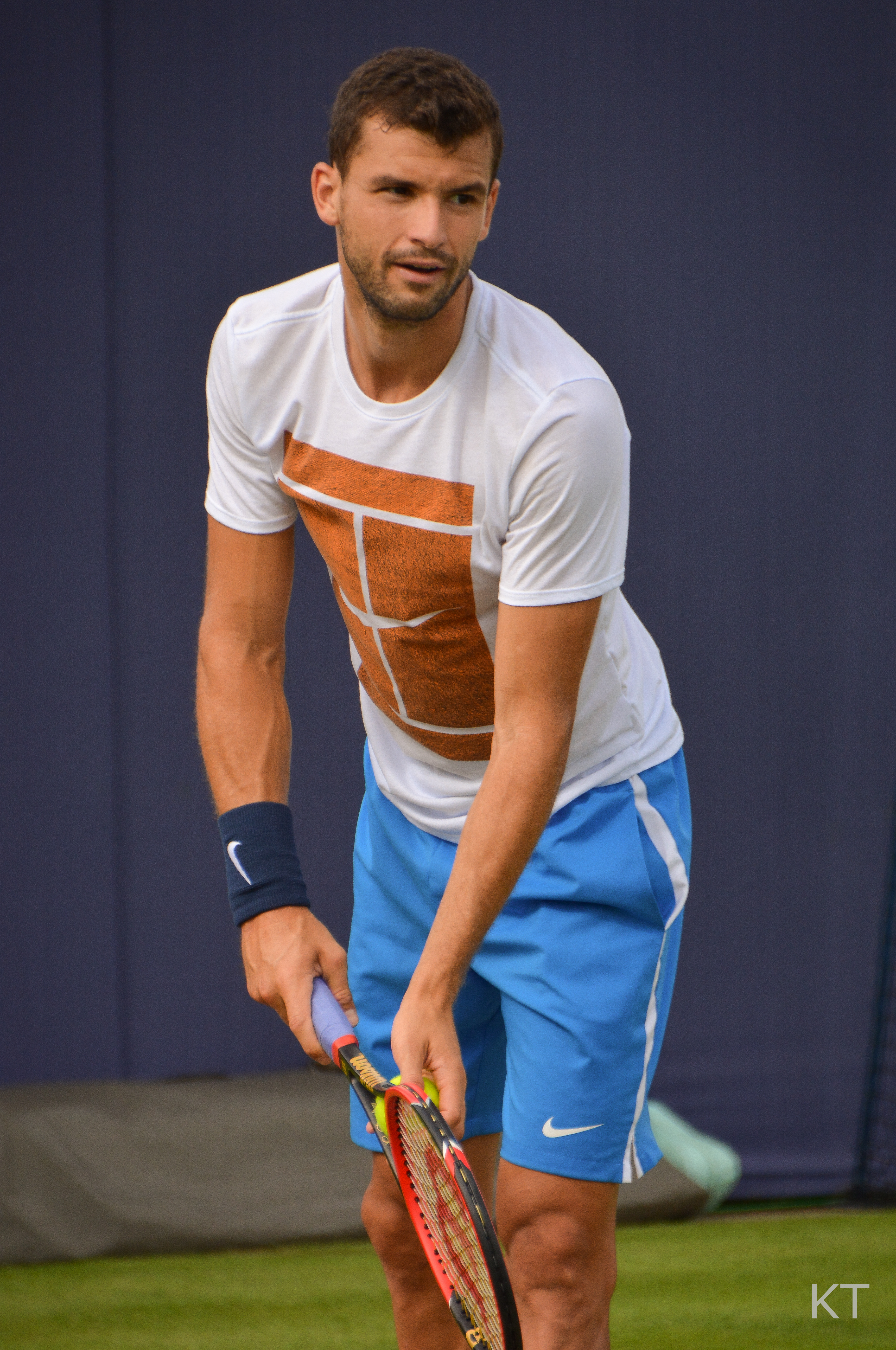 Grigor Dimitrov